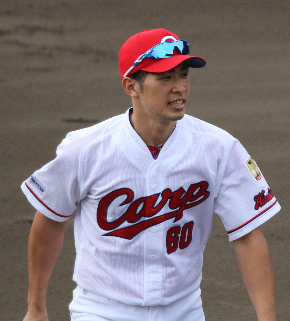 2017年11月7日 天福球場秋季キャンプ